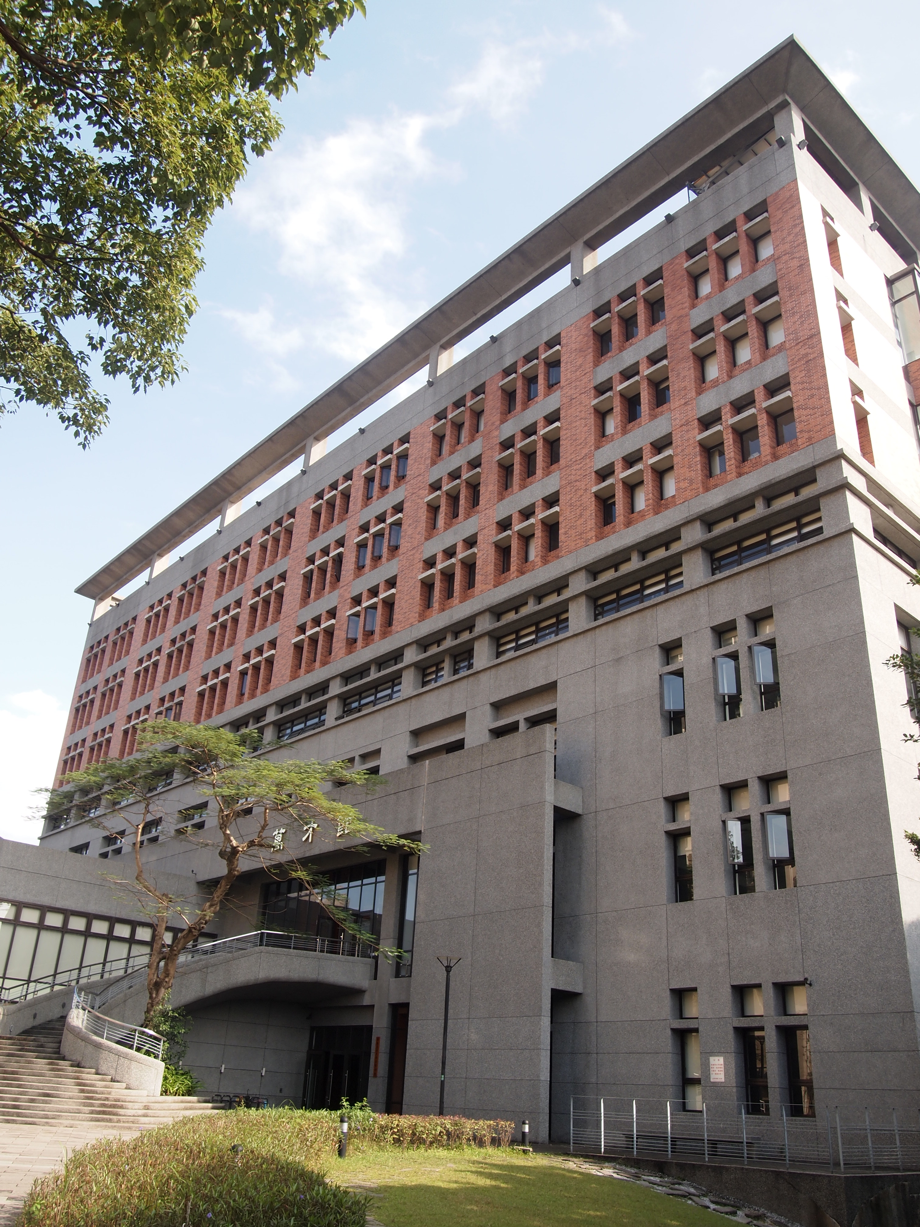 萬才館正面。